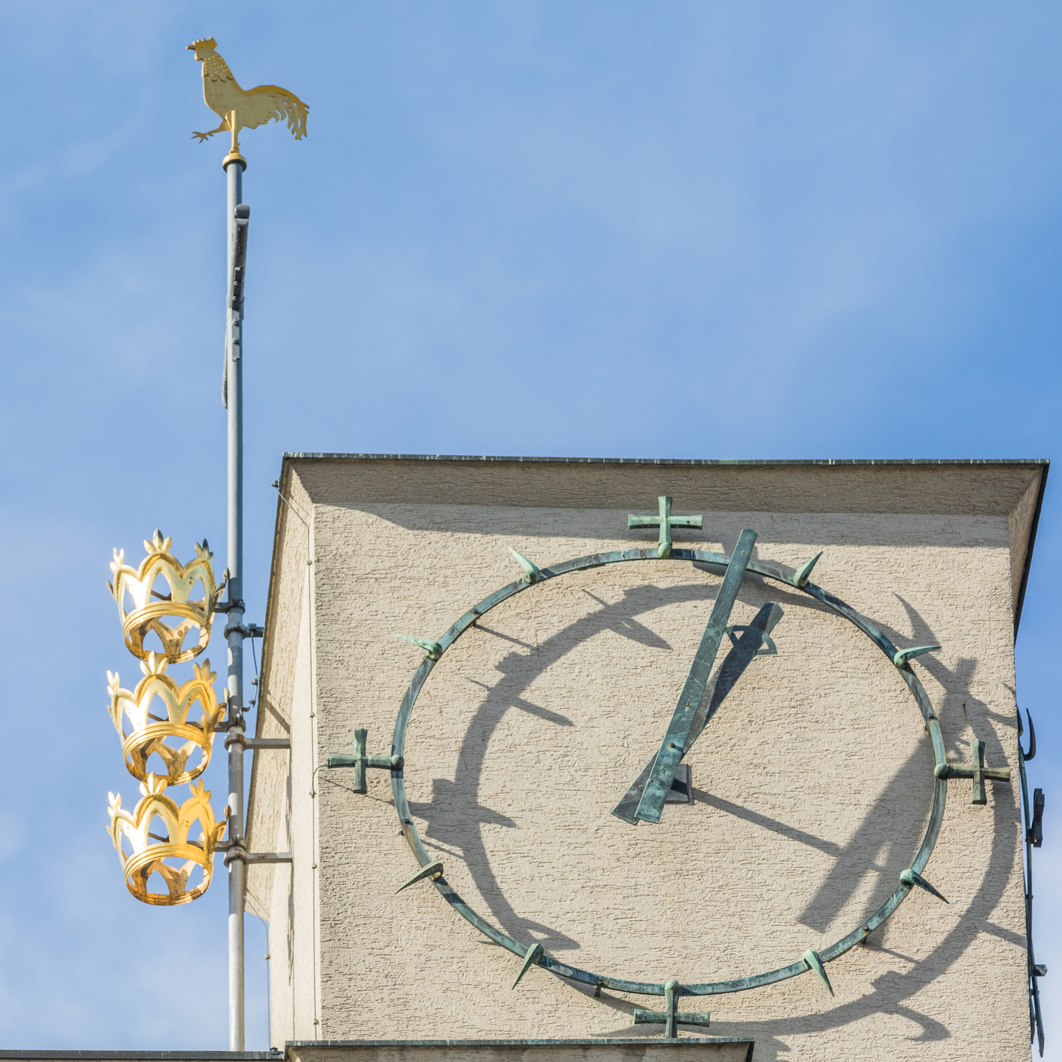 St. Dreikönigen, Köln-Bickendorf This is a photograph of an architectural monument.